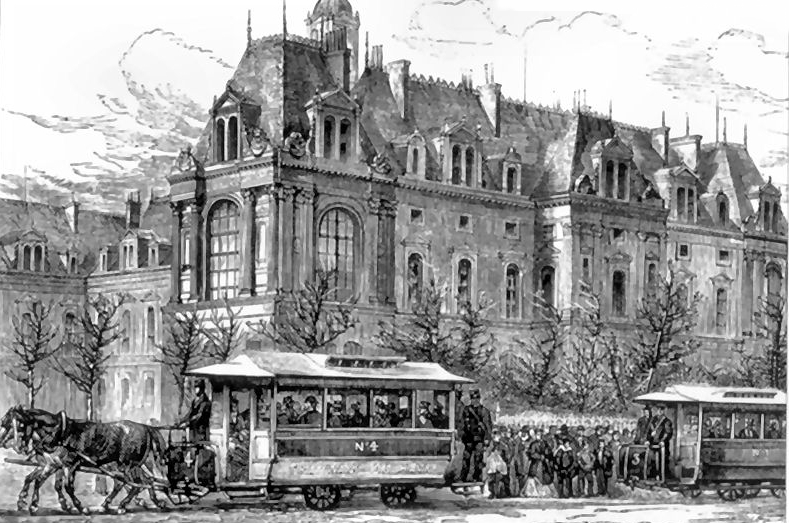 Tramway hippomobile du Havre